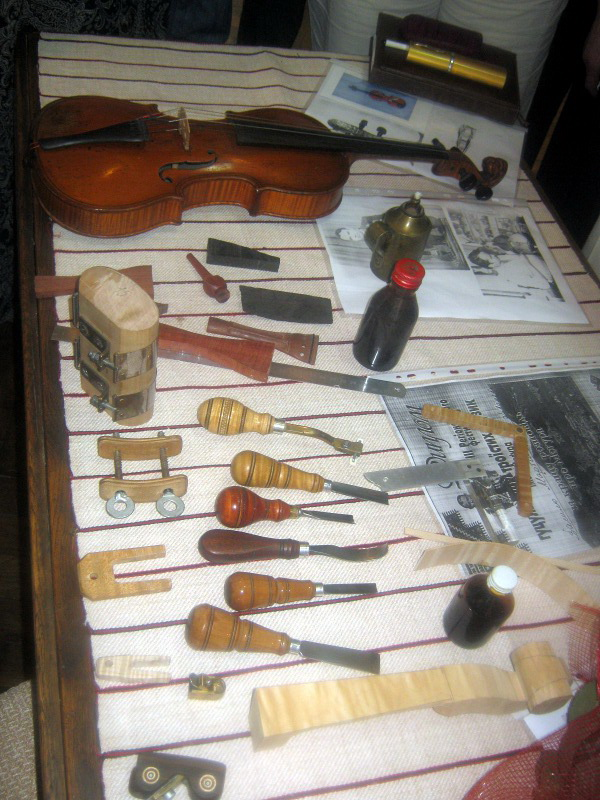 Гуцульська скрипка Мартищука, створена за унікальною авторською технологією